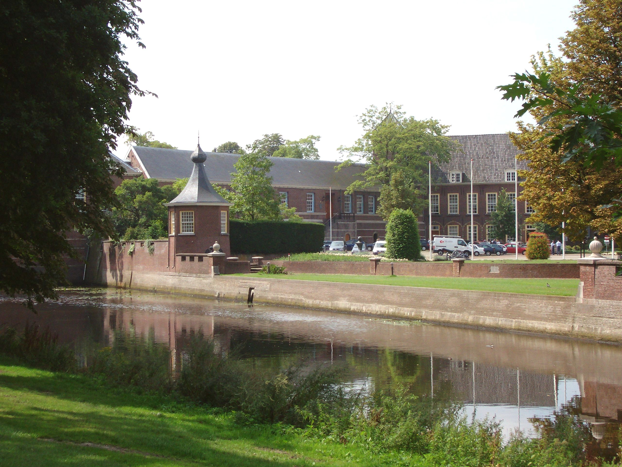 Zicht op deel van het binnenterrein van het kasteel van Breda